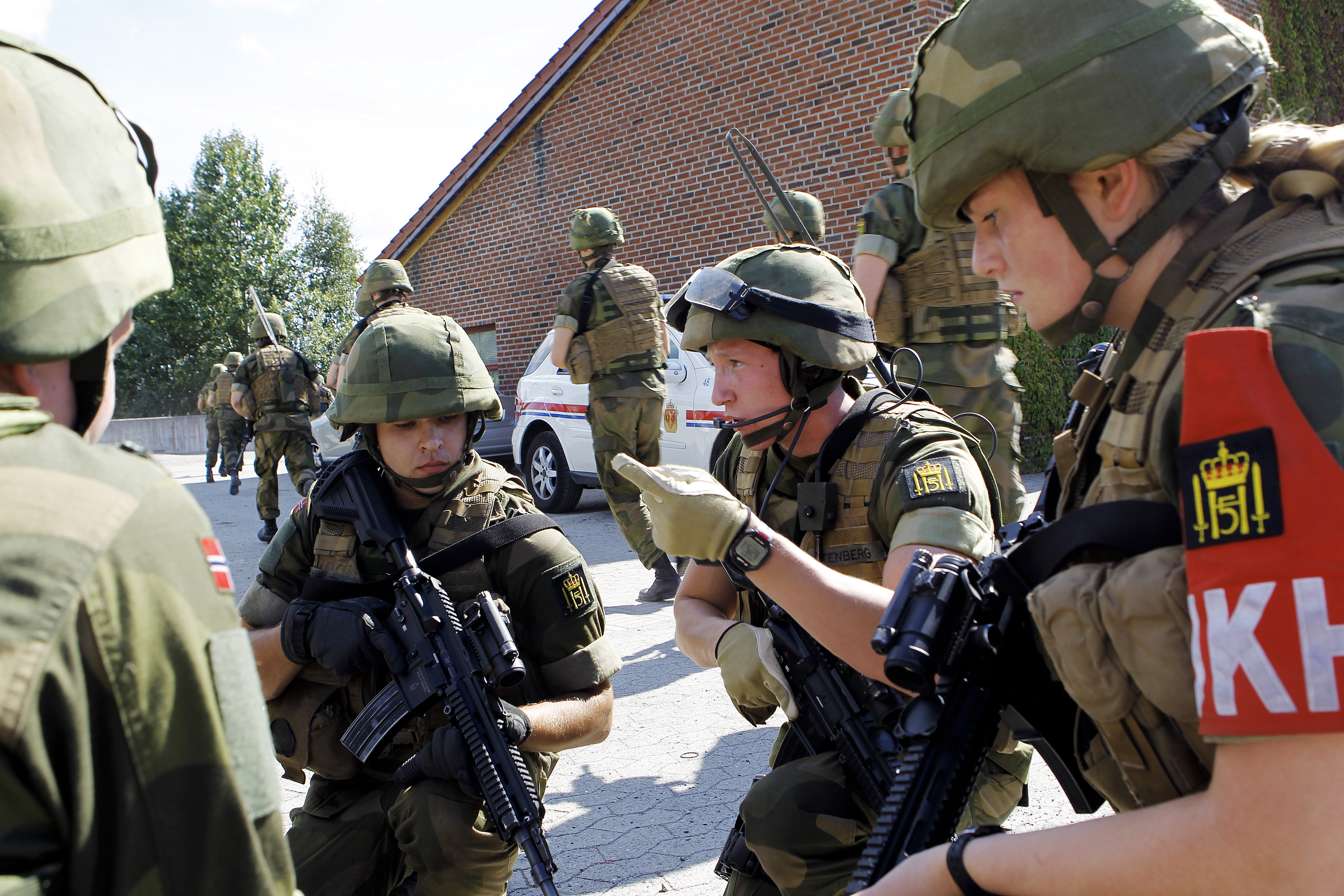 Hans Majestet Kongens Garde har en beredskapsstyrke på over 50 gardister på beredskap for innsats i hovedstaden. Foto: Torbjørn Kjosvold, Forsvaret